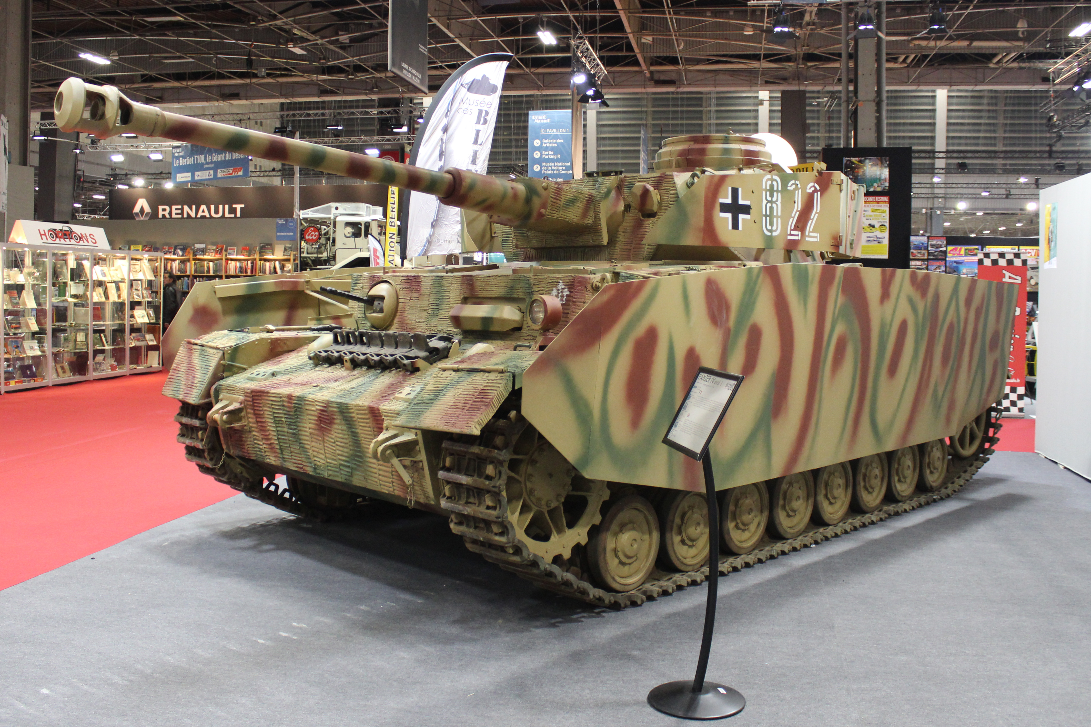 Panzer IV au salon Rétromobile 2019